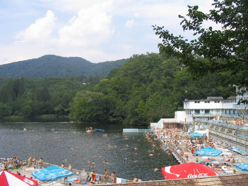 Sovata, Lacul Ursu